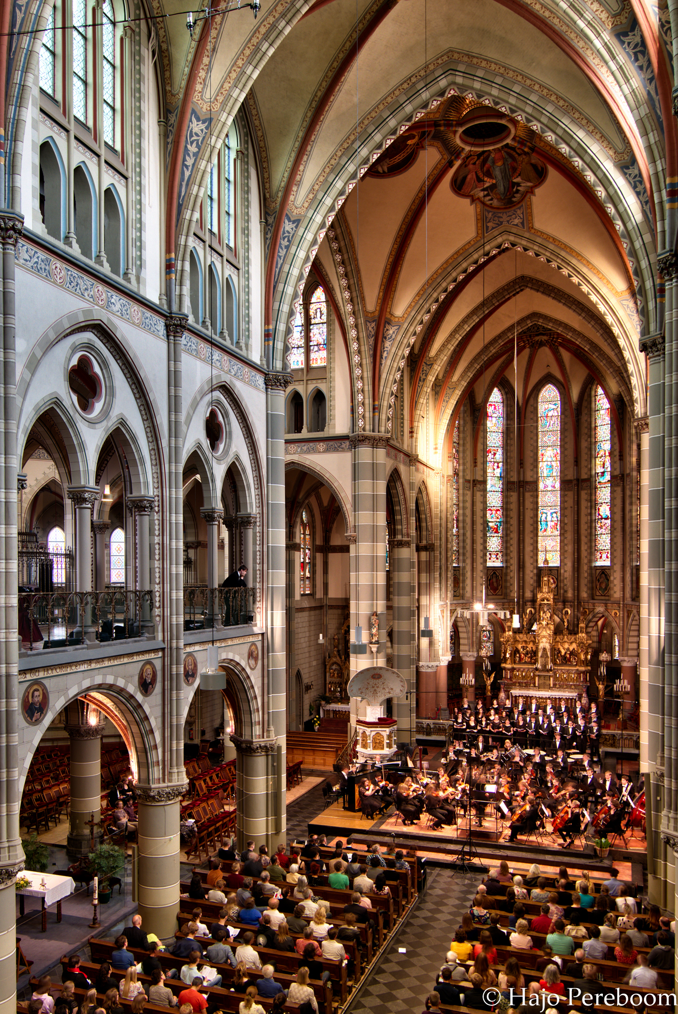 Voorjaarsconcert Elandstraatkerk 22 mei 2014